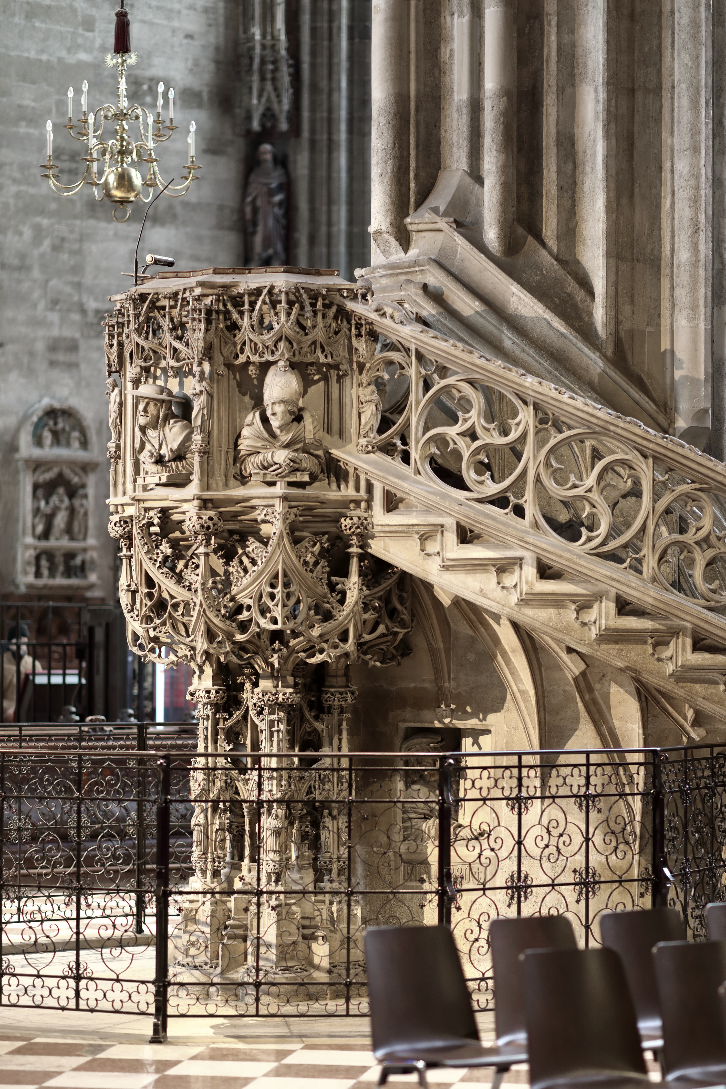 Die Domkanzel des Stephansdoms in der österreichischen Bundeshauptstadt Wien.Die aus 3 Sandsteinblöcken bestehende Domkanzel wird Anton Pilgram zugeschrieben und wurde um 1510 vollendet. Am Kanzelkorb sind die 4 Heiligen und Kirchenväter Augustinus mit Mitra, Gregor der Große mit Papstkrone, Hieronymus mit Kardinalshut und Ambrosius mit Mitra dargestellt (v.l.n.r.).